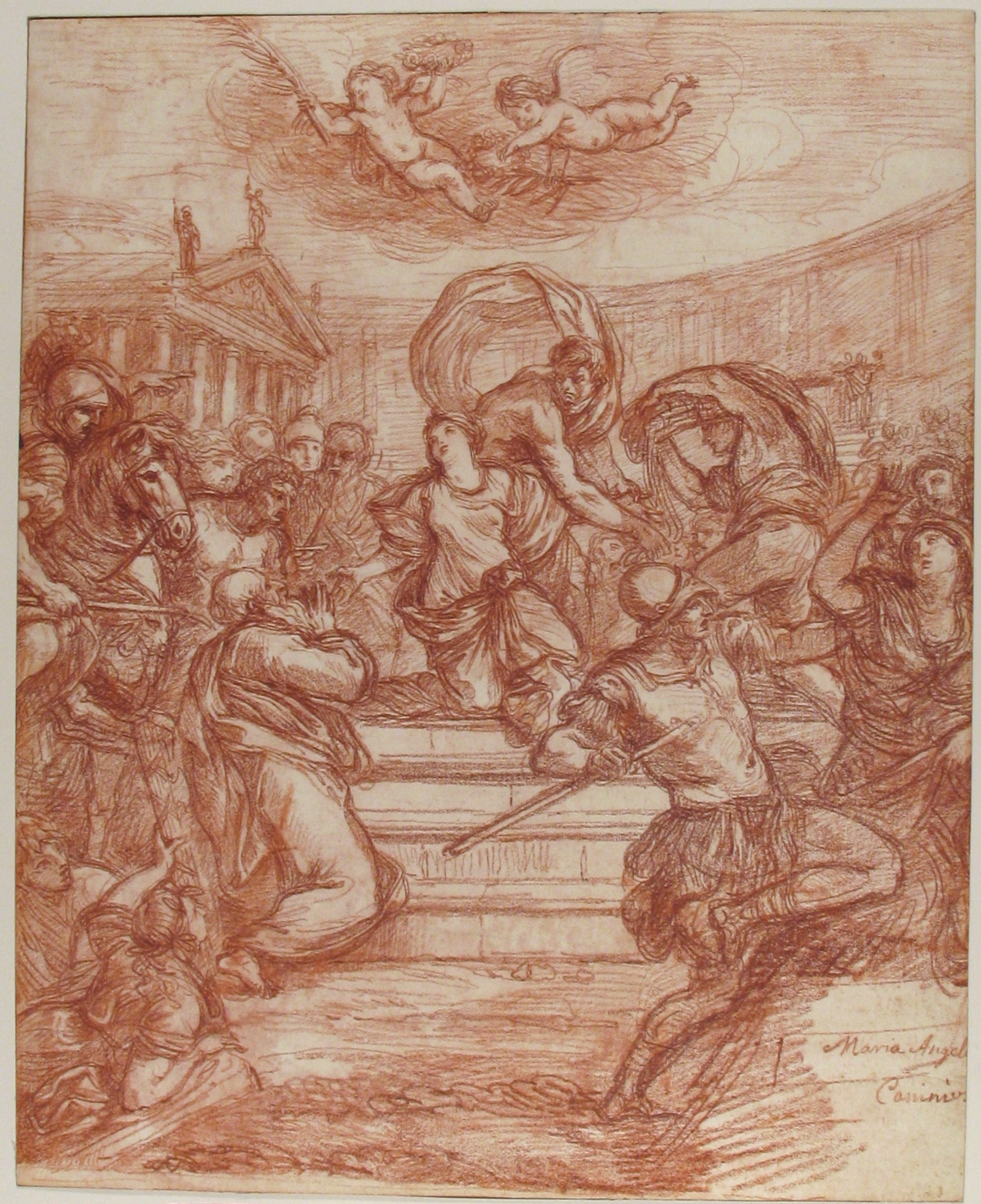 Drawing; Drawings